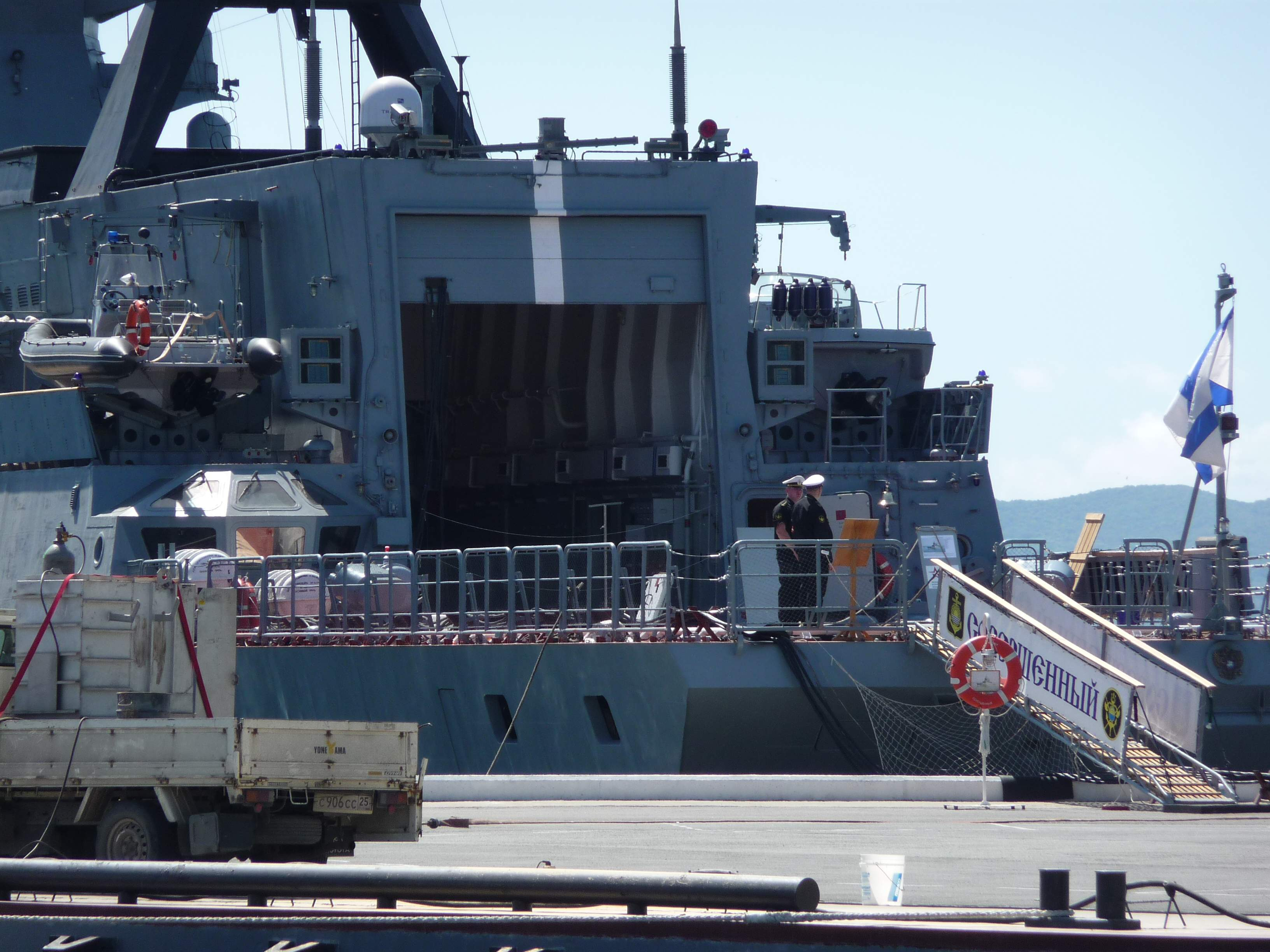 Ангар корвета «Совершенный», Владивосток, 33-й причал, 2017-09-01